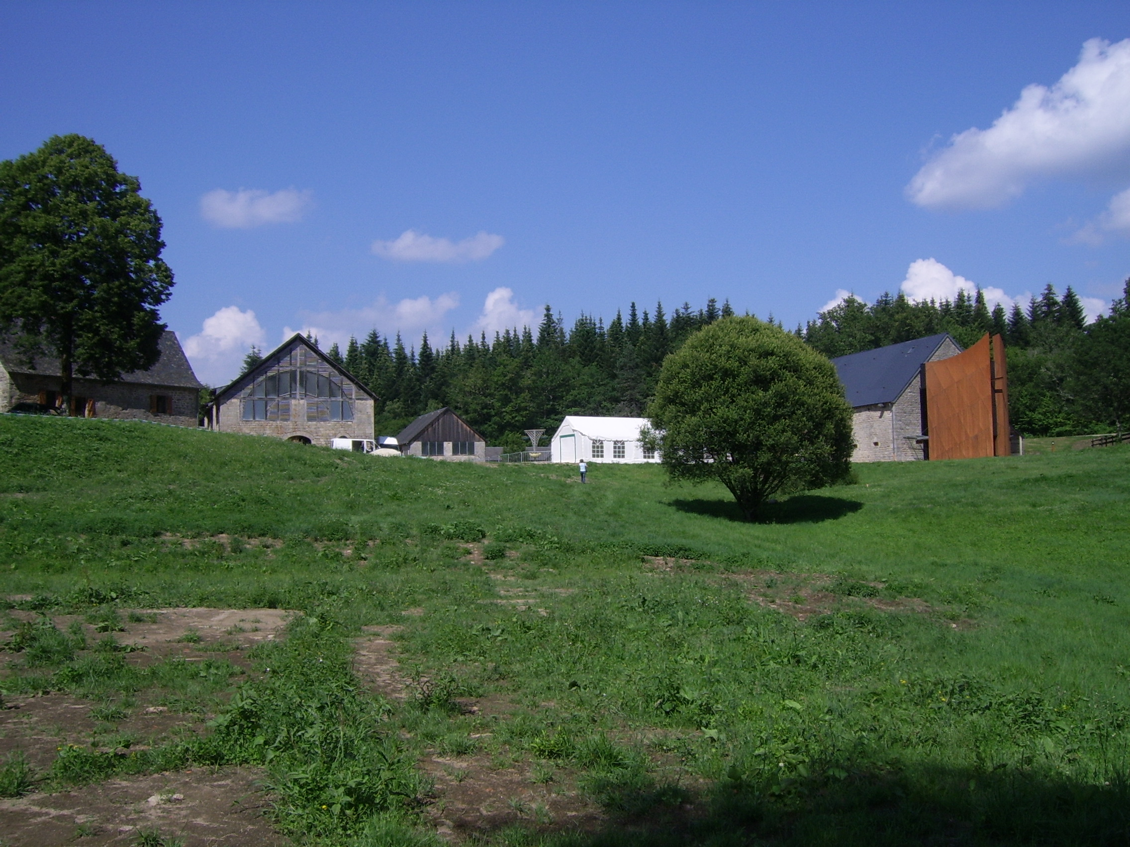 Les granges du domaine de Sédières (Clergoux, 19, France)